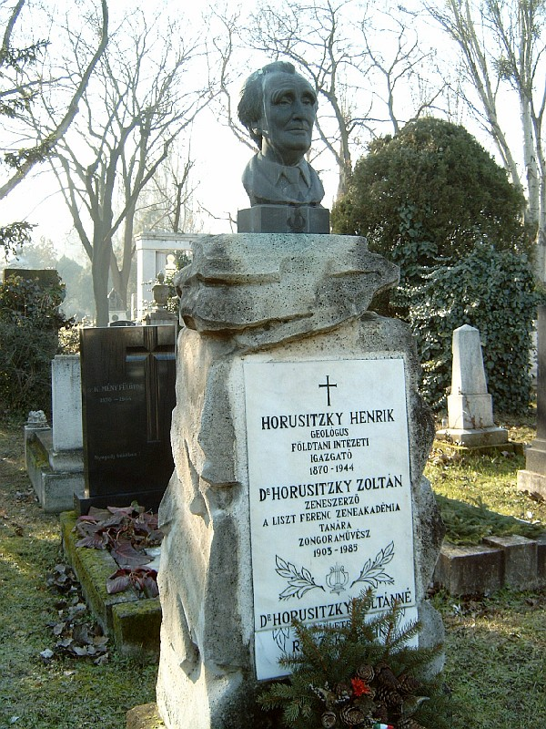 Horusitzky Henrik (Hoch Oujezd, Csehország, 1870. augusztus 3. – Budapest, 1944. augusztus 25.) geológus és Horusitzky Zoltán (Pápa, 1903. július 18. – Budapest, 1985. április 25.) zeneszerző, zongoraművész, zongoratanár, költő sírja Budapesten. Kerepesi temető: 34-7-6 [szobrász: Kelemen Kristóf].